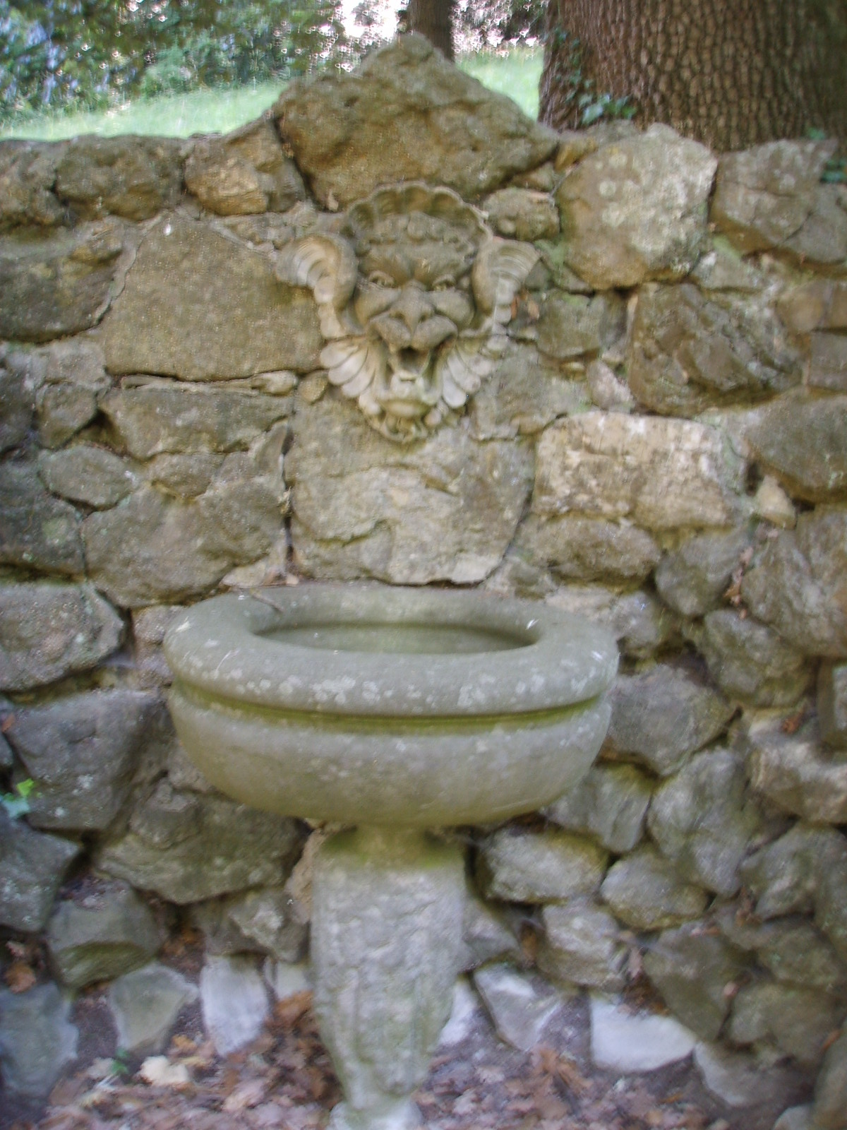 Mascherone di fontana alla Villa La Petraia, Florence, Italy.